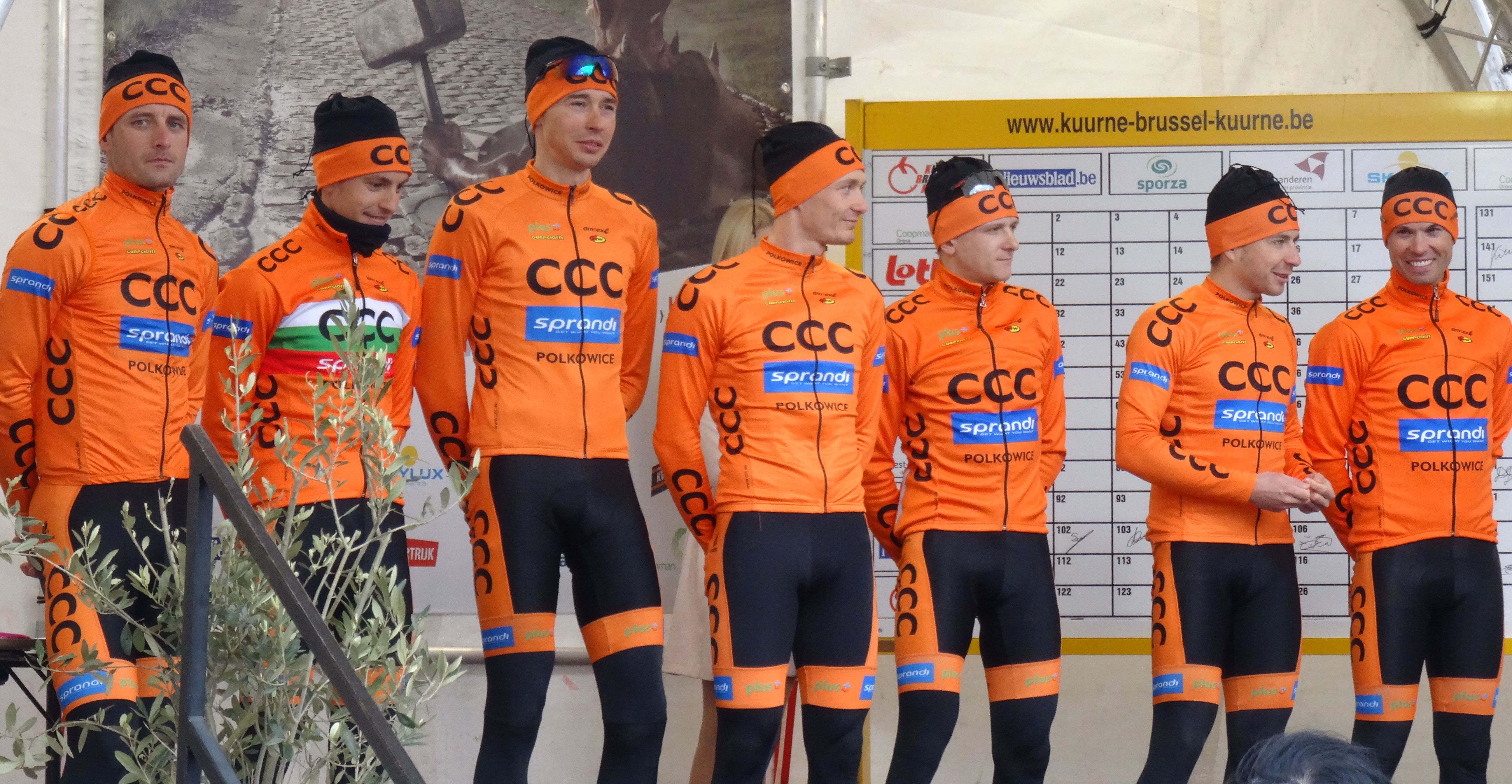 Reportage réalisé le dimanche 1er mars à l'occasion du départ et de l'arrivée de Kuurne-Bruxelles-Kuurne 2015 à Kuurne, Belgique.